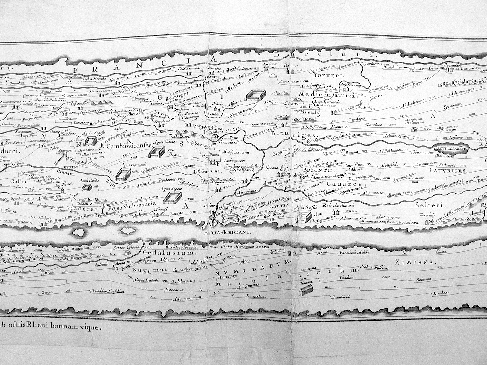 Cliché d'une partie de la copie de la Table de Peutinger conservée à l'IGN